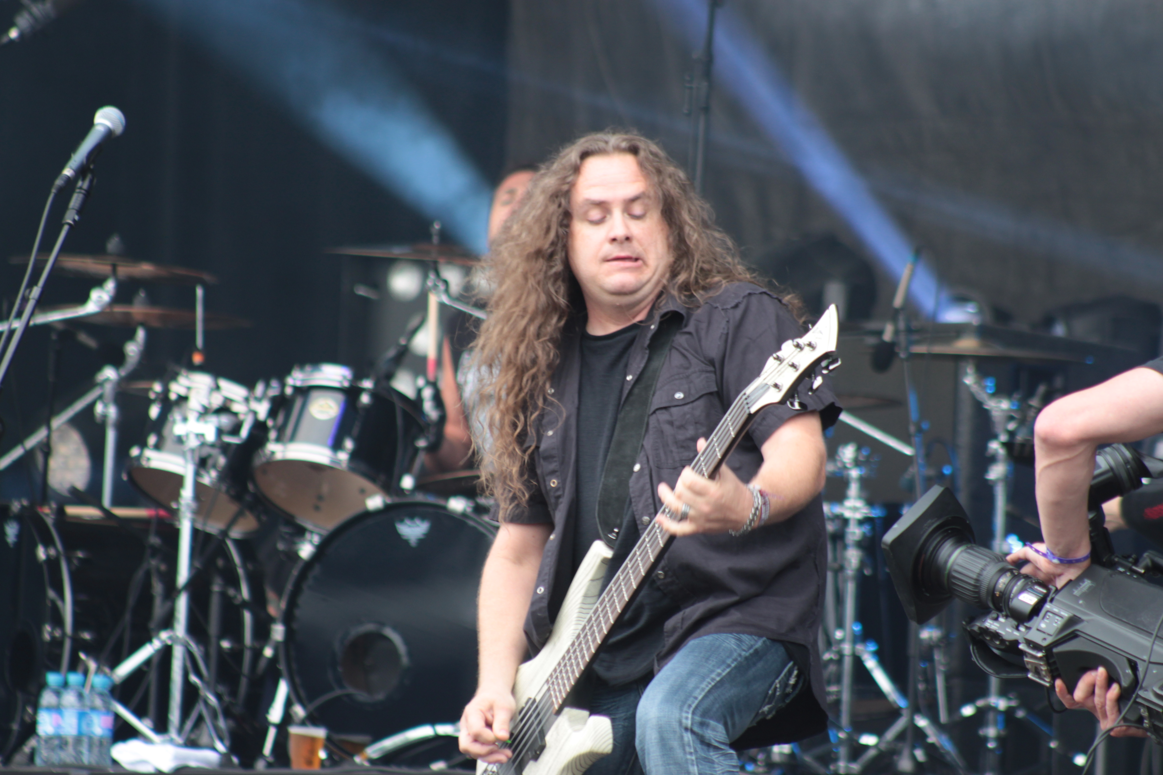 Jason Viebrooks, Heathen, Helfest 2013, Fr-44-Clisson.